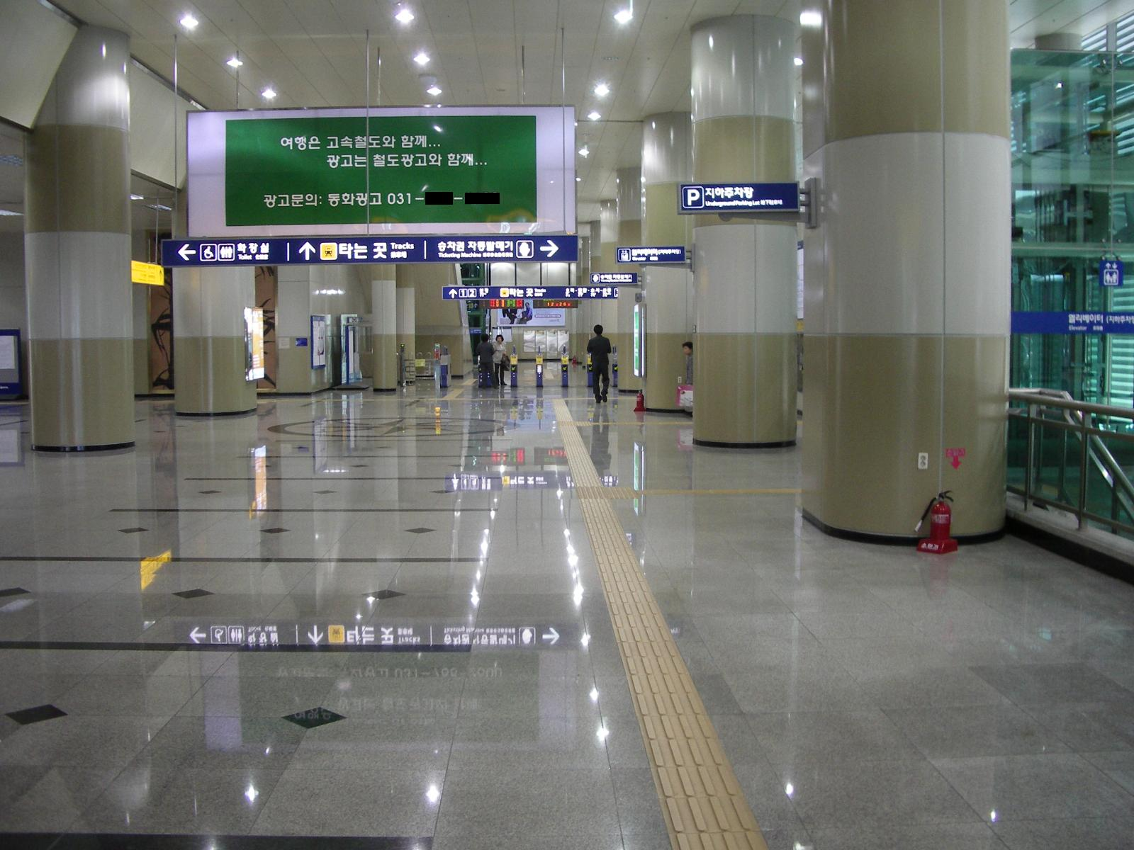 죽전역 구내